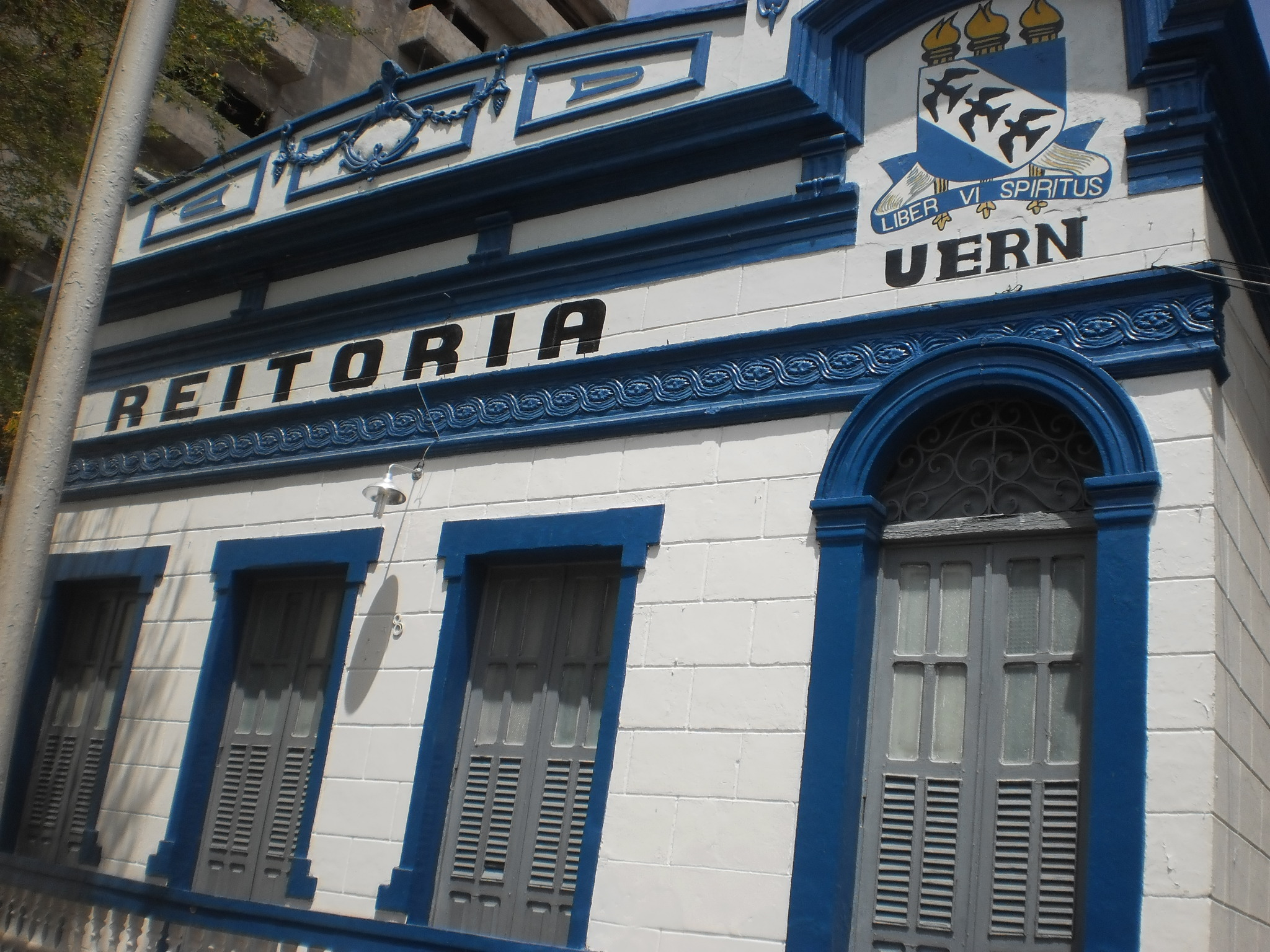 Reitoria da UERN - Mossoró, RN.